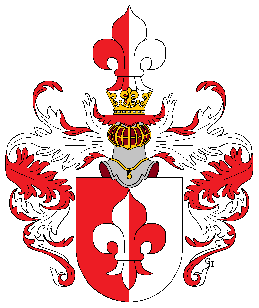 Wappen des österreichischen Astronomen und Initiators der neuen Universitätssternwarte Wien Joseph Johann Littrow (1781–1840), verliehen anlässlich seiner Erhebung in den österreichischen Adelsstand mit dem Ehrenwort "Edler von" 1836. Zeichnung von Gerd Hruška ( Für weitere Informationen zu dieser Standeserhebung siehe (